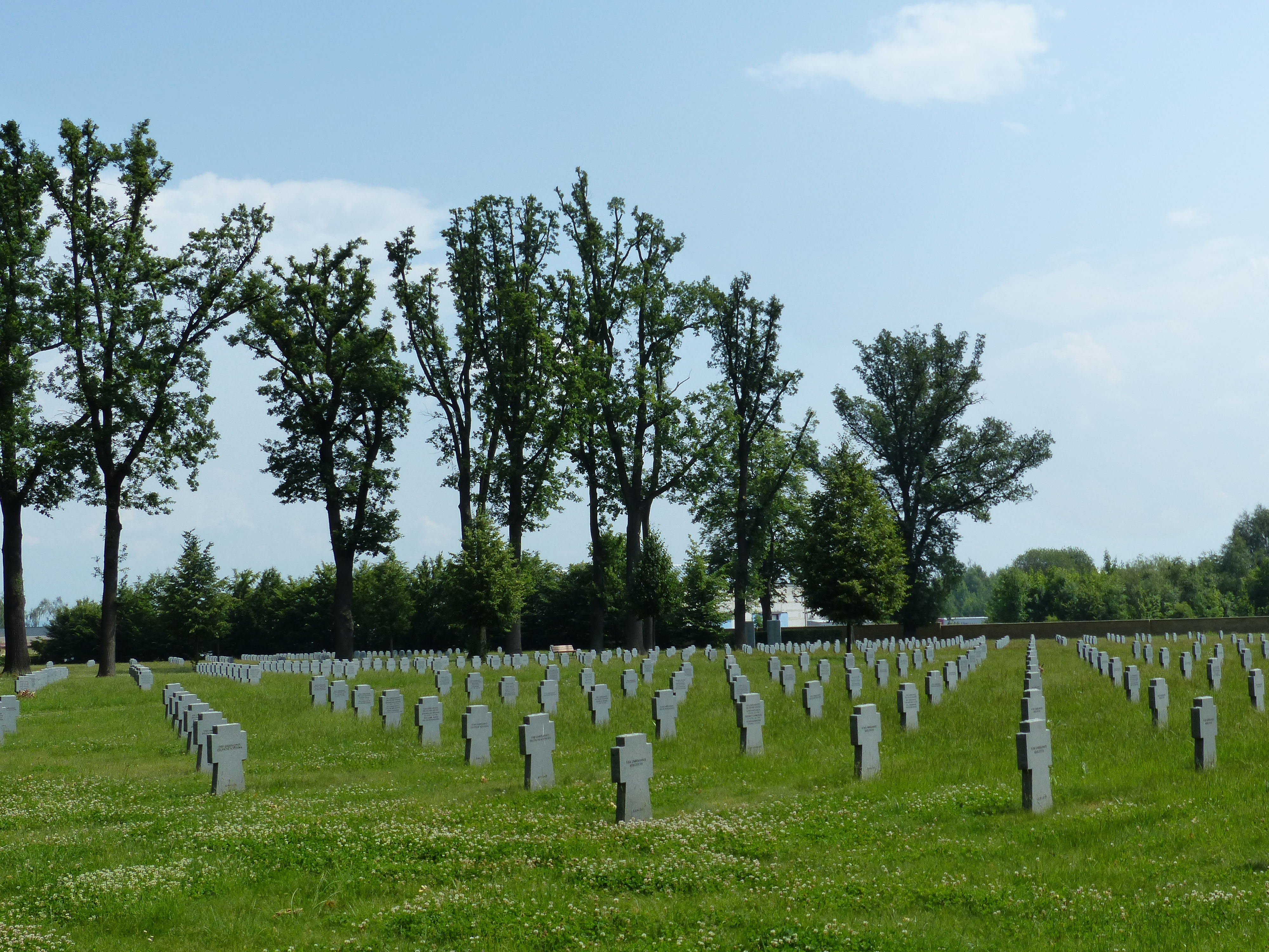 Bildeserie Kriegsgräberstätte Cheb auf dem Stadtfriedhof